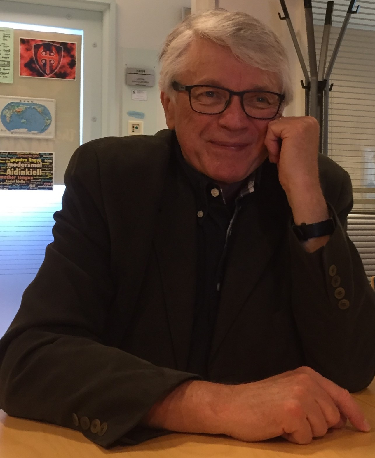 Jürgen Schopp Tampereen yliopistolla